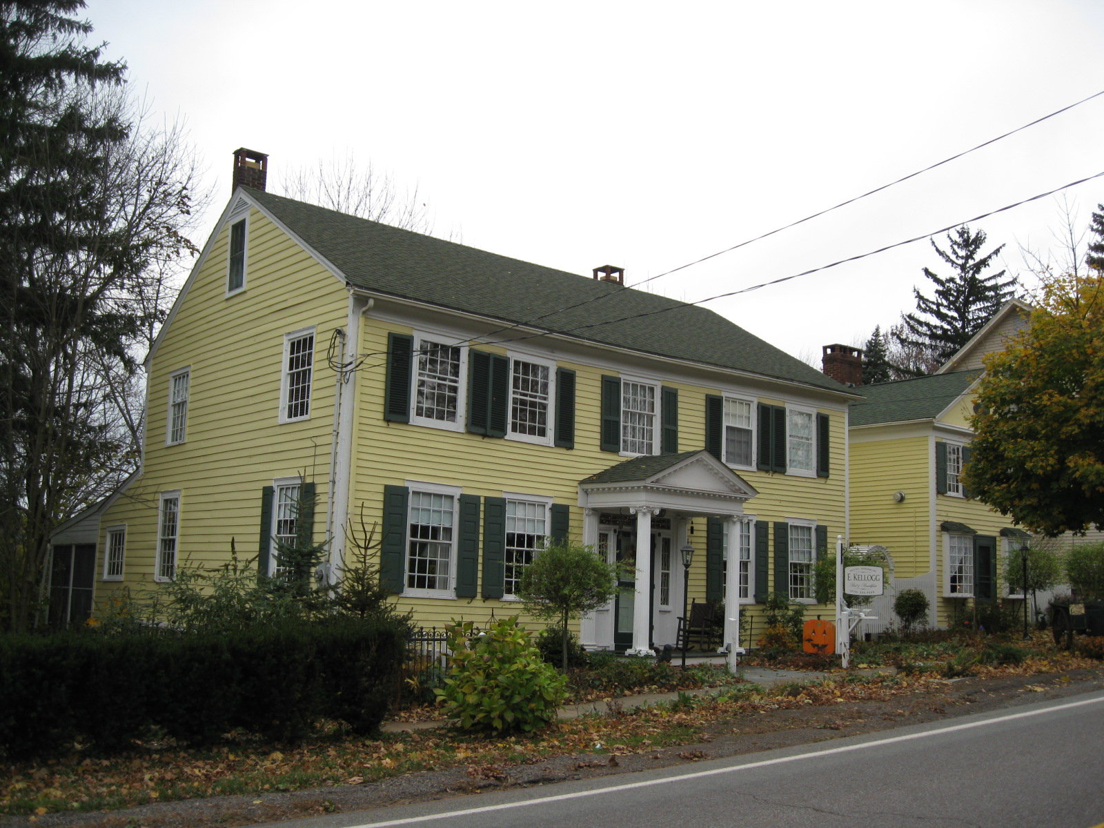 Bethany, Pennsylvania